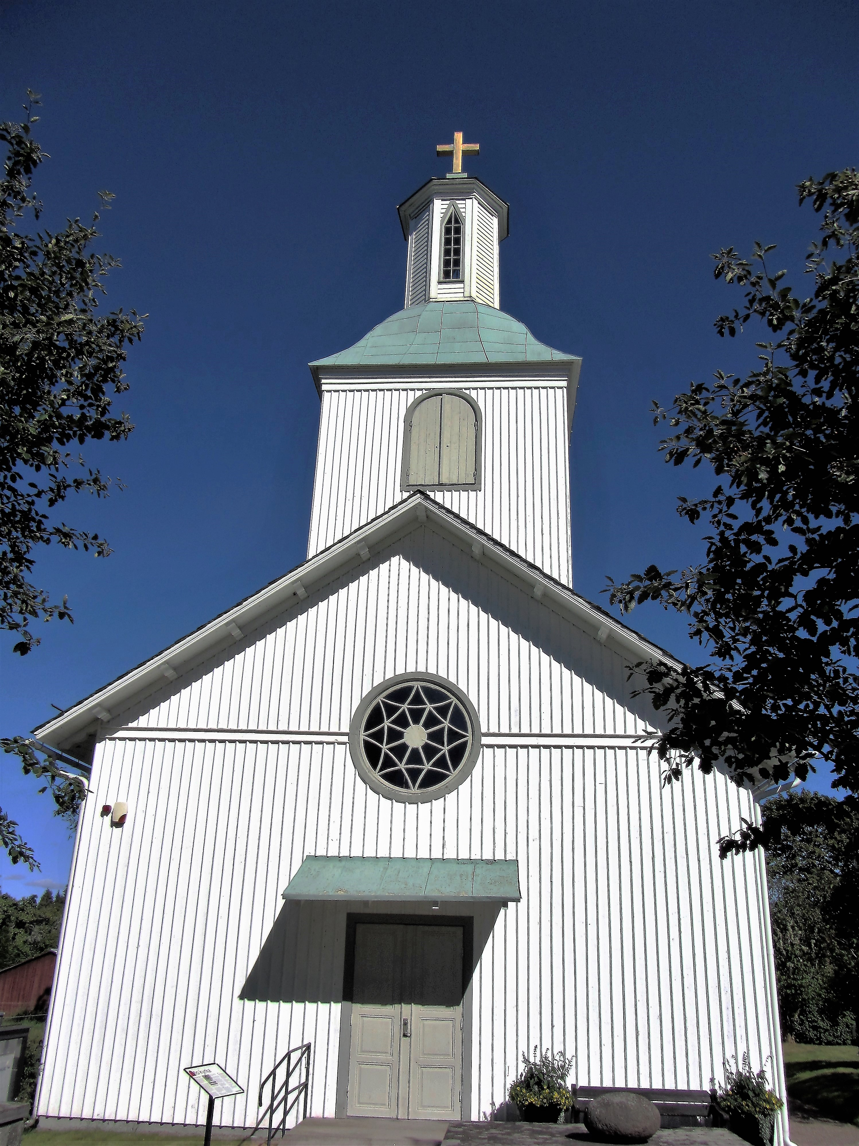 Mo kyrka i norra Dalsland nära gränsen mot Värmland, nordväst om Åmål.